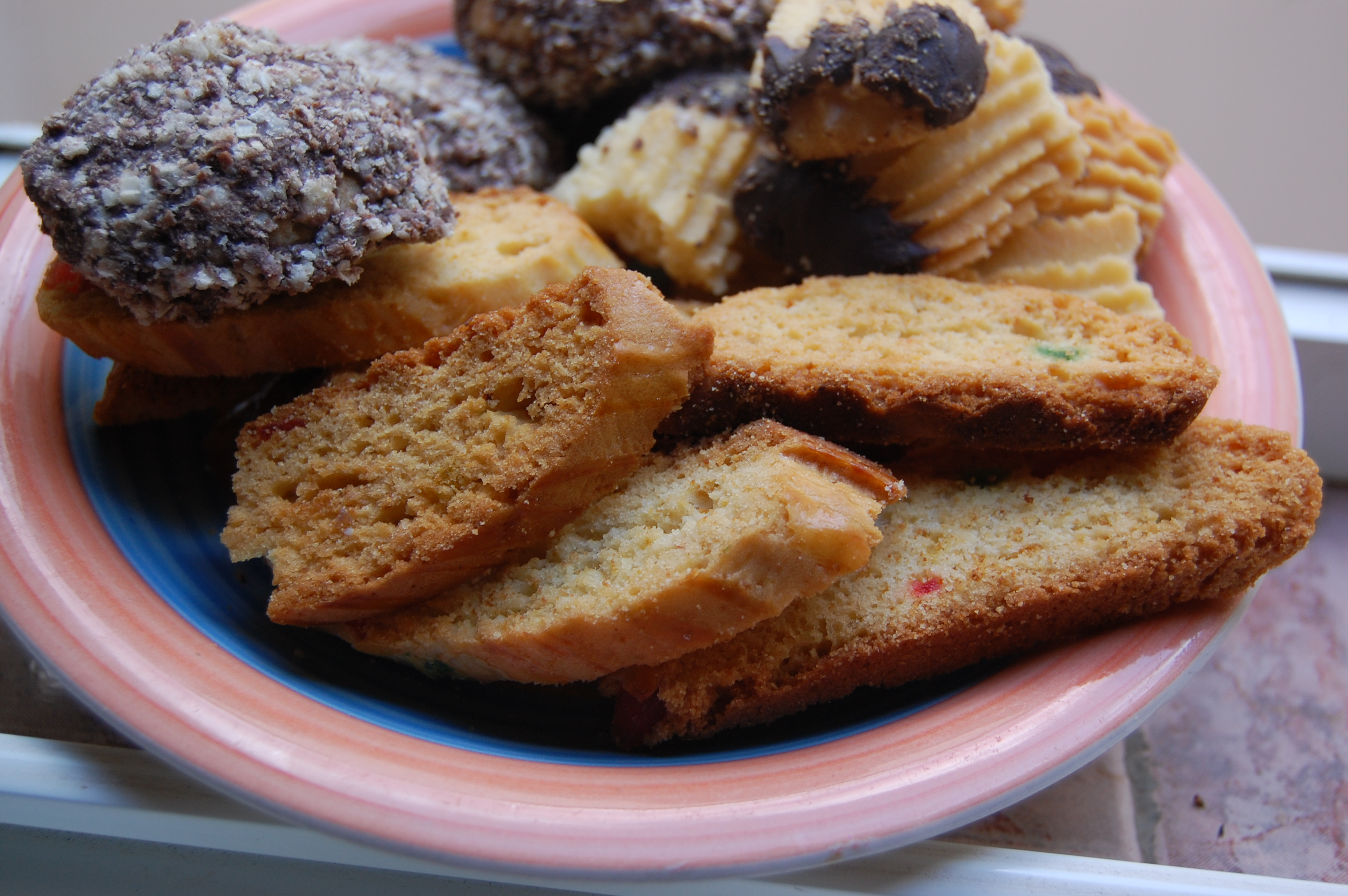 Walon: fekkasses avou ds ôtès biscûtesلمغربية: فقّاص مع حلاويات خرى